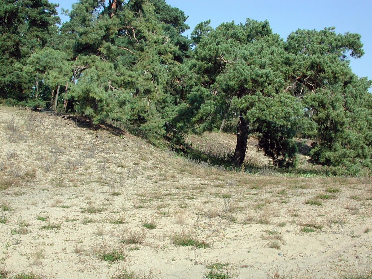 Pfungstädter Düne, Pfungstadt, Hessen, Deutschland